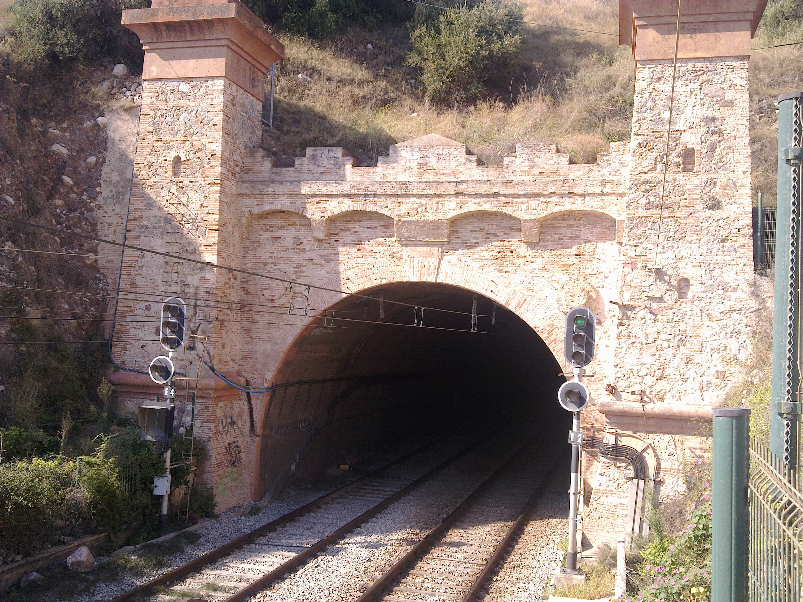 Túnel ferroviari del turó de Montgat (Maresme)